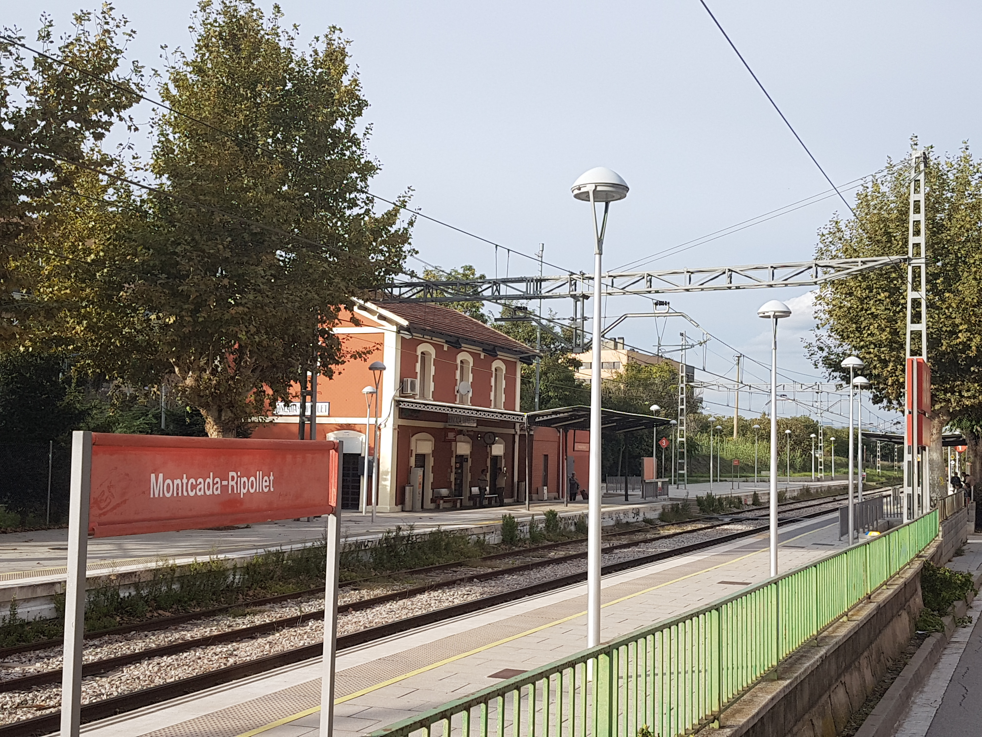 Estació de Montcada-Ripollet de la línia Barcelona-Ripoll